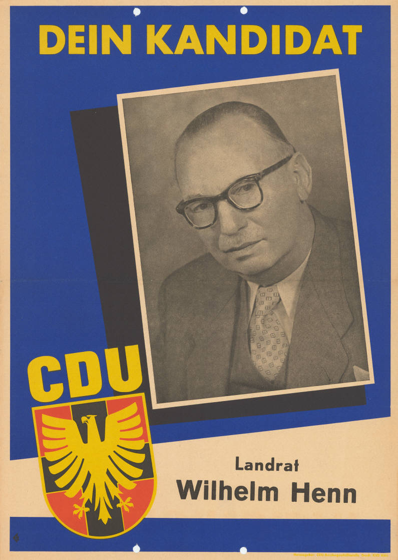 Dein Kandidat CDU Landrat Wilhelm Henn Abbildung: Porträtfoto - CDU-Logo Plakatart: Kandidaten-/Personenplakat mit Porträt Auftraggeber: CDU-Bundesgeschäftsstelle Drucker_Druckart_Druckort: KVD, Köln Objekt-Signatur: 10-009 : 299 Bestand: Landtagswahlplakate Nordrhein-Westfalen (10-009) GliederungBestand10-18: Landtagswahlplakate Nordrhein-Westfalen (10-009) » Landtagswahl am 27.6.1954 » CDU » mit Porträt-Foto Lizenz: KAS/ACDP 10-009 : 299 CC-BY-SA 3.0 DE